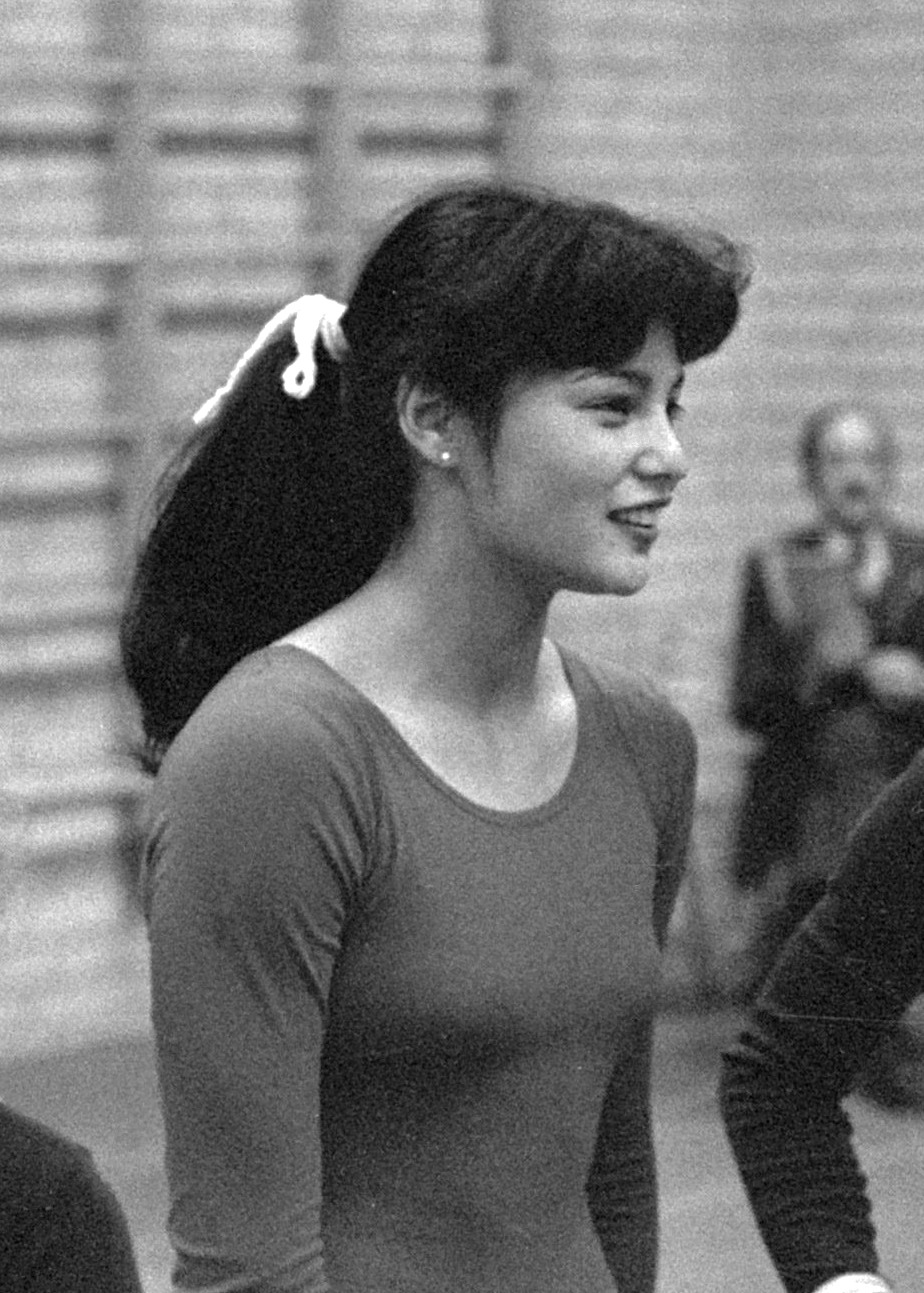 Nationale Turnkampioenschappen dames in Utrecht; Jeannette van Ravenstijn